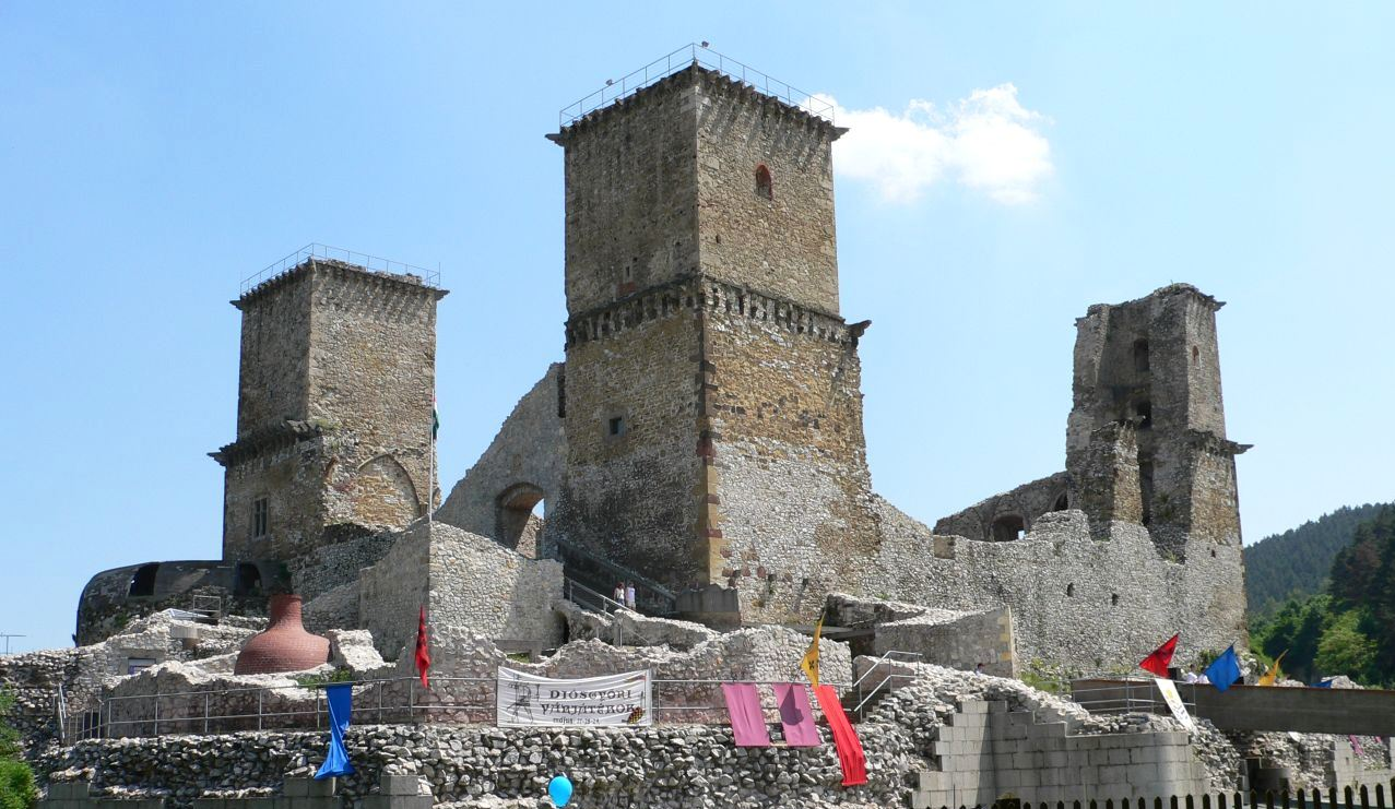 Diosgyori_Var-Miskolc-Hungary-Europe.